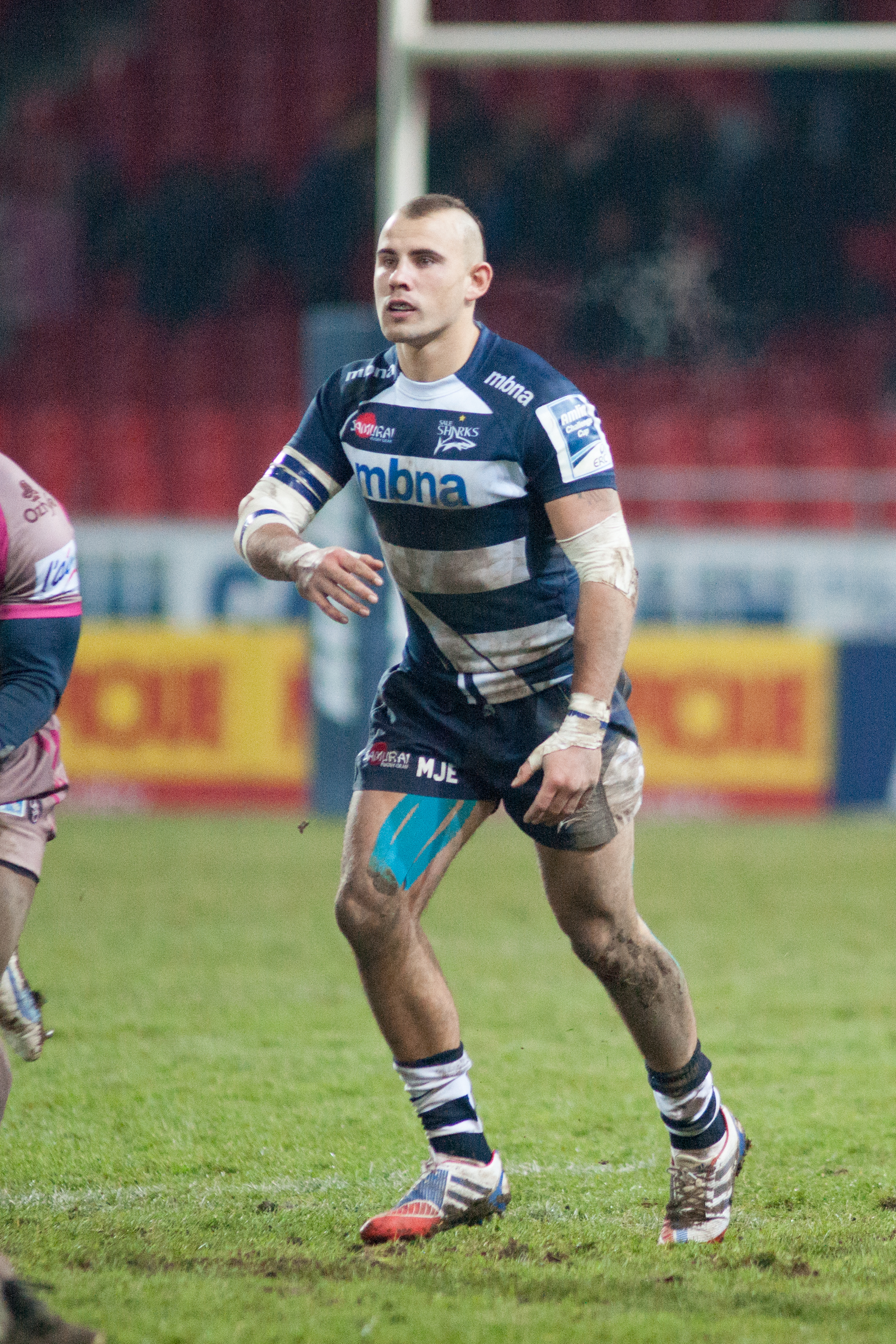 US Oyonnax c. Sale Sharks, 5 décembre 2013.